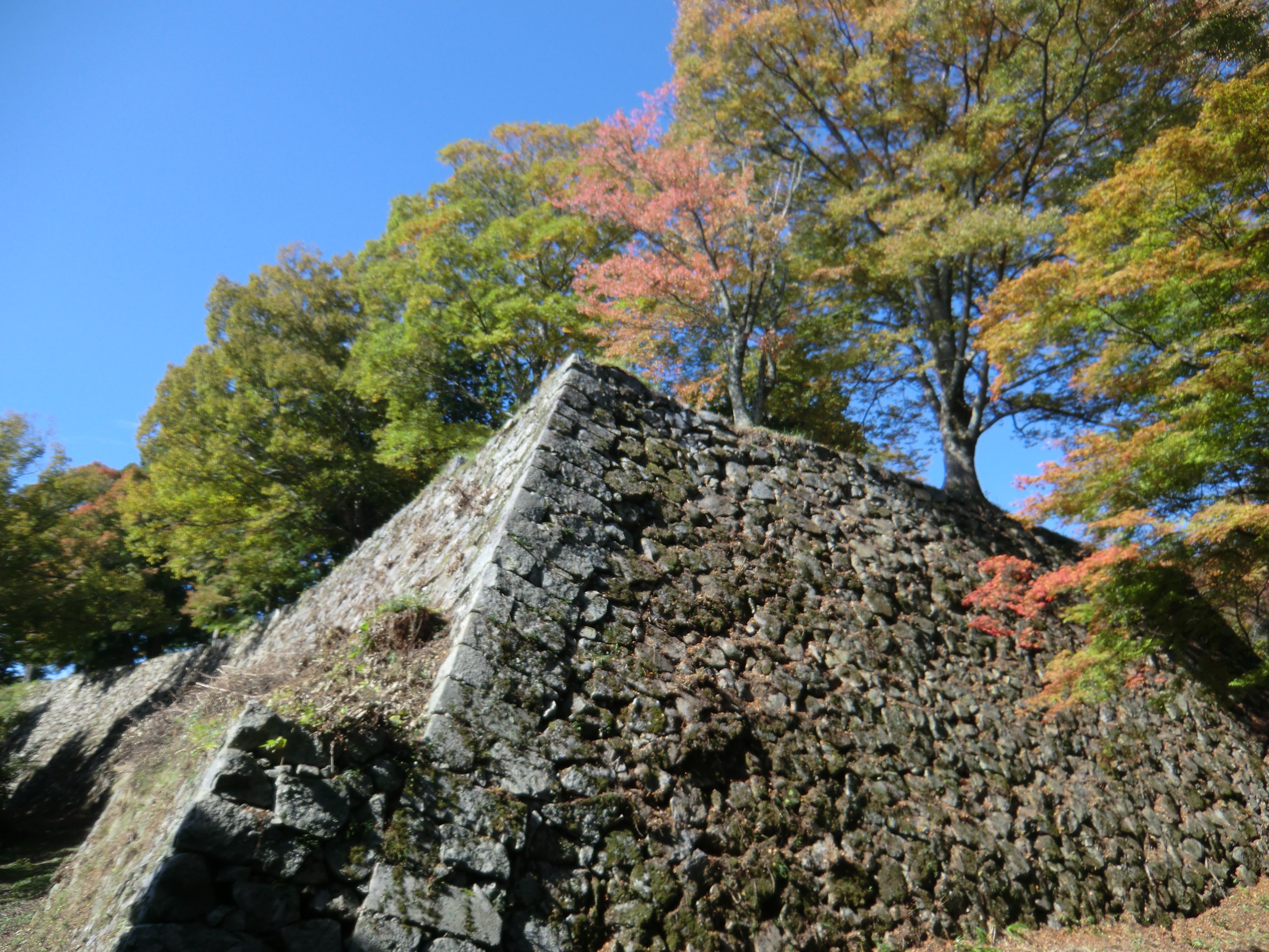 高取城、東南角より見上げる本丸の石垣